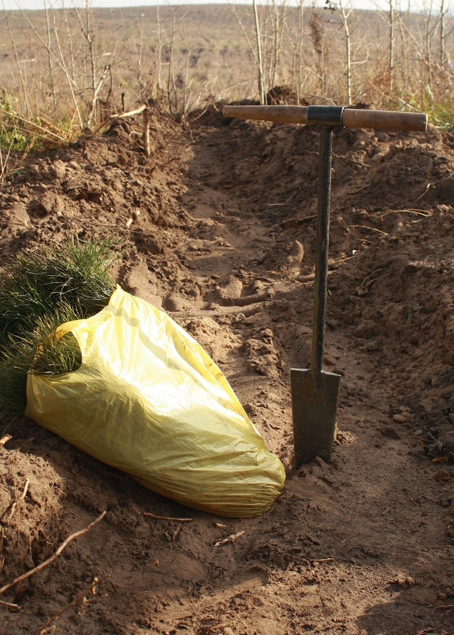 Меч Колесова и пакет с саженцами сосны обыкновенной. Посадка леса в г.о. Тольятти.